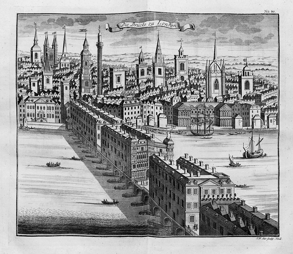 London Bridge, from: C. C. Schramm: Historischer Schauplatz, in welcher die merkwürdigsten Brücken aus allen vier Theilen der Welt, insonderheit aber die in den vollkommensten Stand versetzte Dresdner Elb-Brücke, in saubern Prospecten, Münzen und andern Kupferstichen, vorgestellet und beschrieben werden. Leipzig, B. C. Breitkopf, 1735.